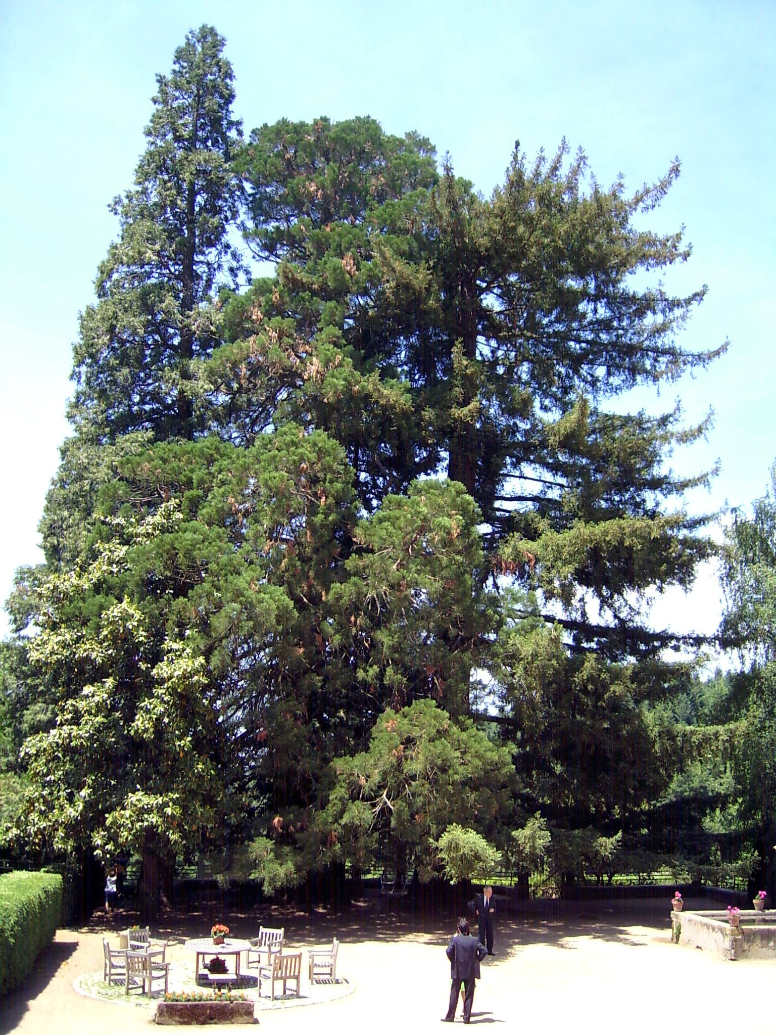 Selfmade Family Cupressaceae Species Sequoiadendron giganteum (izquierdo/left) Species Sequoia sempervirens (derecha/right) Sequoia del Noguer, Viladrau Patrimoni natural Arbres monumentals Catalunya és un país amb una superfície forestal considerable. Més de la meitat del seu territori, uns 19.000 km2, és ocupada per més d'un centenar d'espècies diferents d'arbres. Entre ells hi ha alguns exemplars que destaquen de la resta: es tracta d'arbres que per un motiu o un altre han cridat l'atenció. Molts d'aquests arbres han estat fins i tot batejats i hom els coneix amb un nom propi: són els arbres monumentals. Més